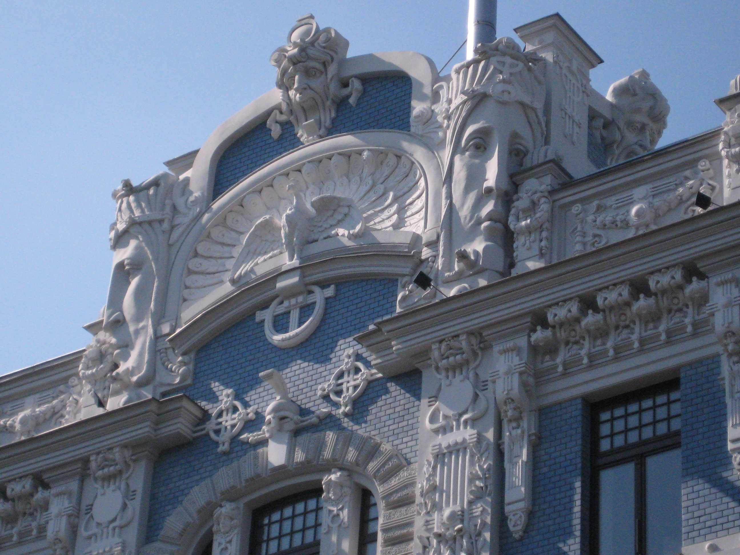 Jugendstil in Riga